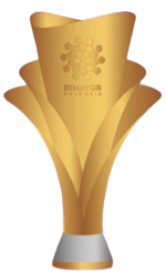 Trofeo Liga Águila Femnina 2017 - Actualidad